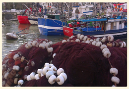 Santurtziko portua: barku eta trainak.